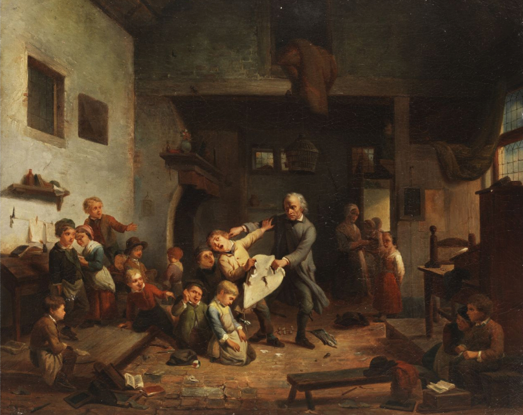 Der strenge Dorflehrer, Öl auf Leinwand, 67 x 83 cm